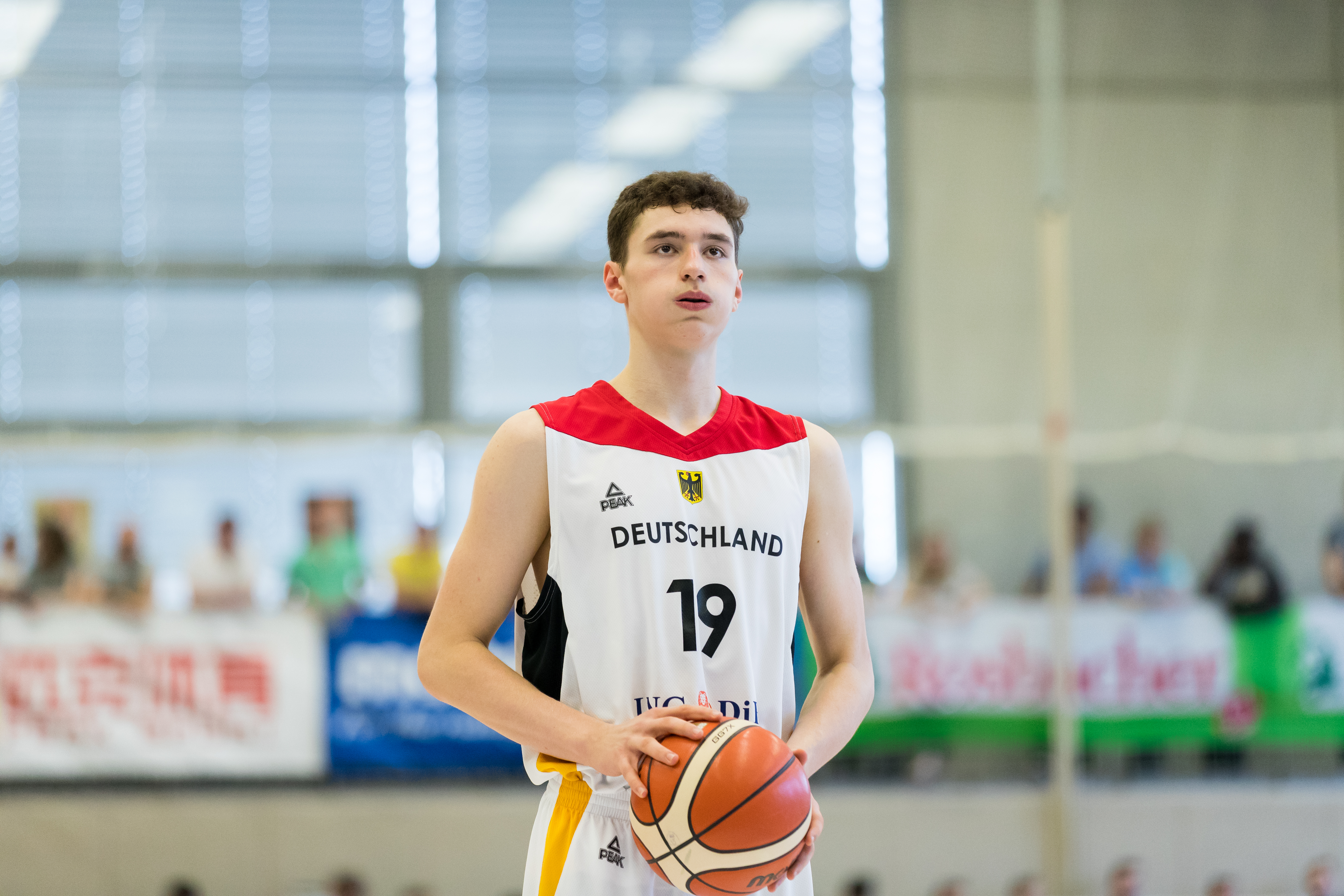 Australia vs Germany 66:88 during final Basketball Albert Schweitzer Turnier at GBG Halle, Mannheim, Baden-Württemberg, Germany on 2018-04-07, Photo: Sven Mandel